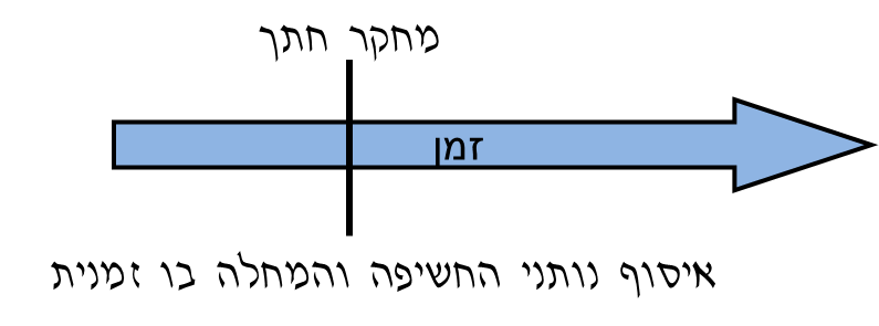 מחקר חתך